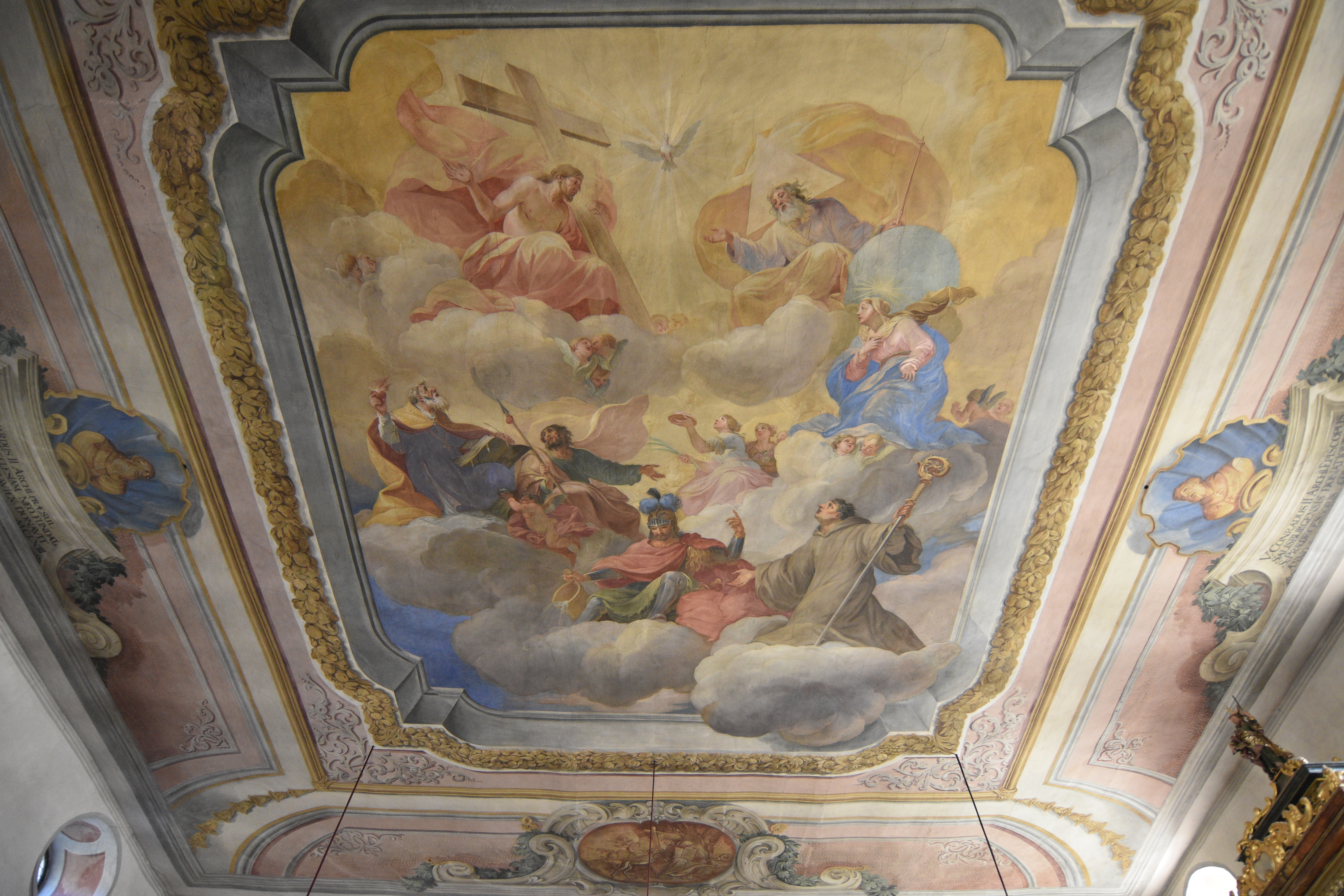 Church hl. Ägydius (Vorau) - Interior